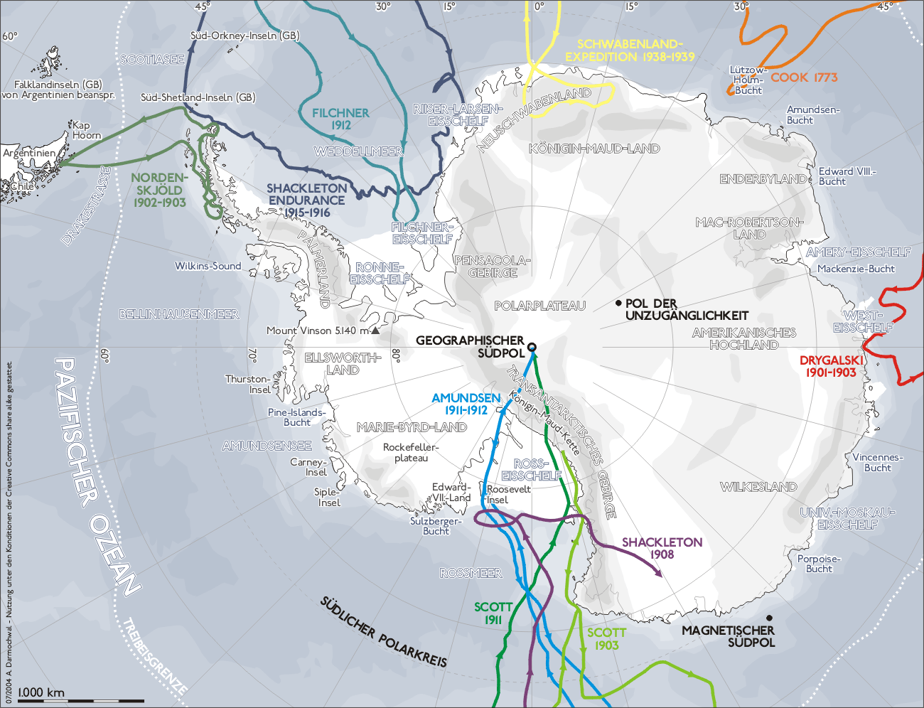 Darstellung zeigt die Antarktis und die Expeditionen zu ihrer Erforschung. Zeichnung erstellt 2004 von Benutzer:Sansculotte. Bild ist unter der GNU FDL zur weiteren Verwendung freigegeben. Quellenangabe und Beleg an erbeten.